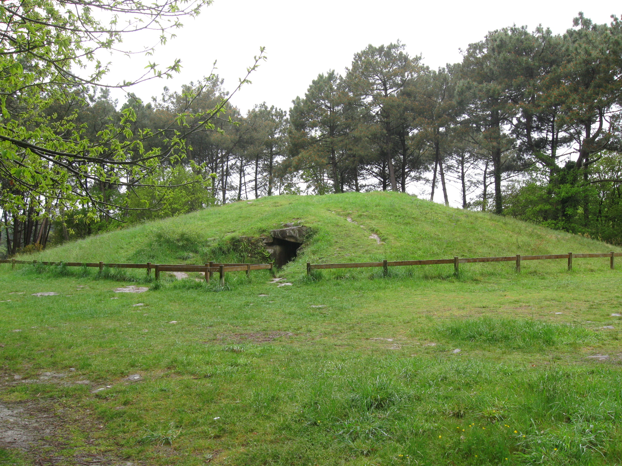 Tumulus von Kernours, bei Bono, Morbihan